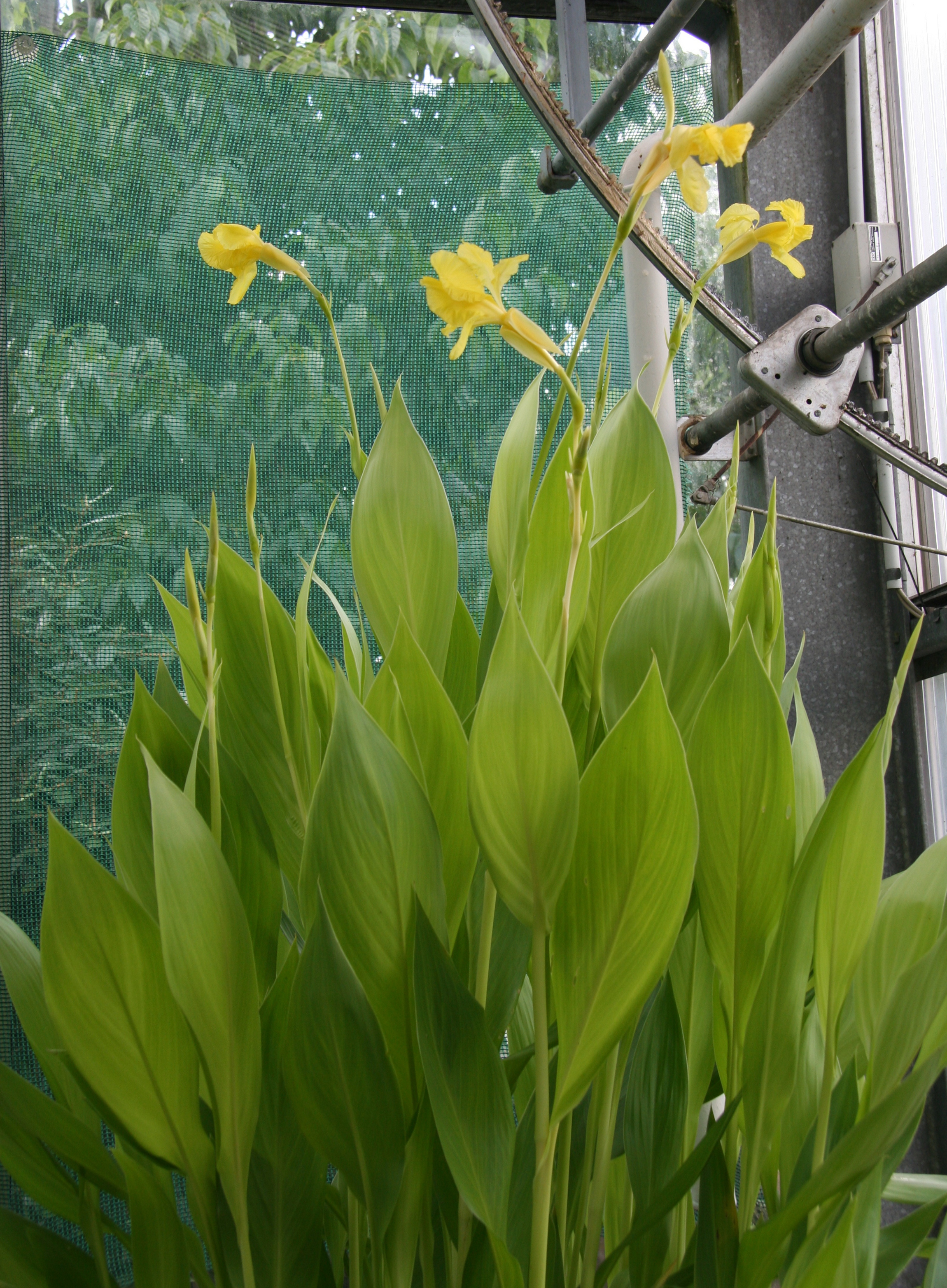 Canna flaccida im Botanischen Garten Dresden